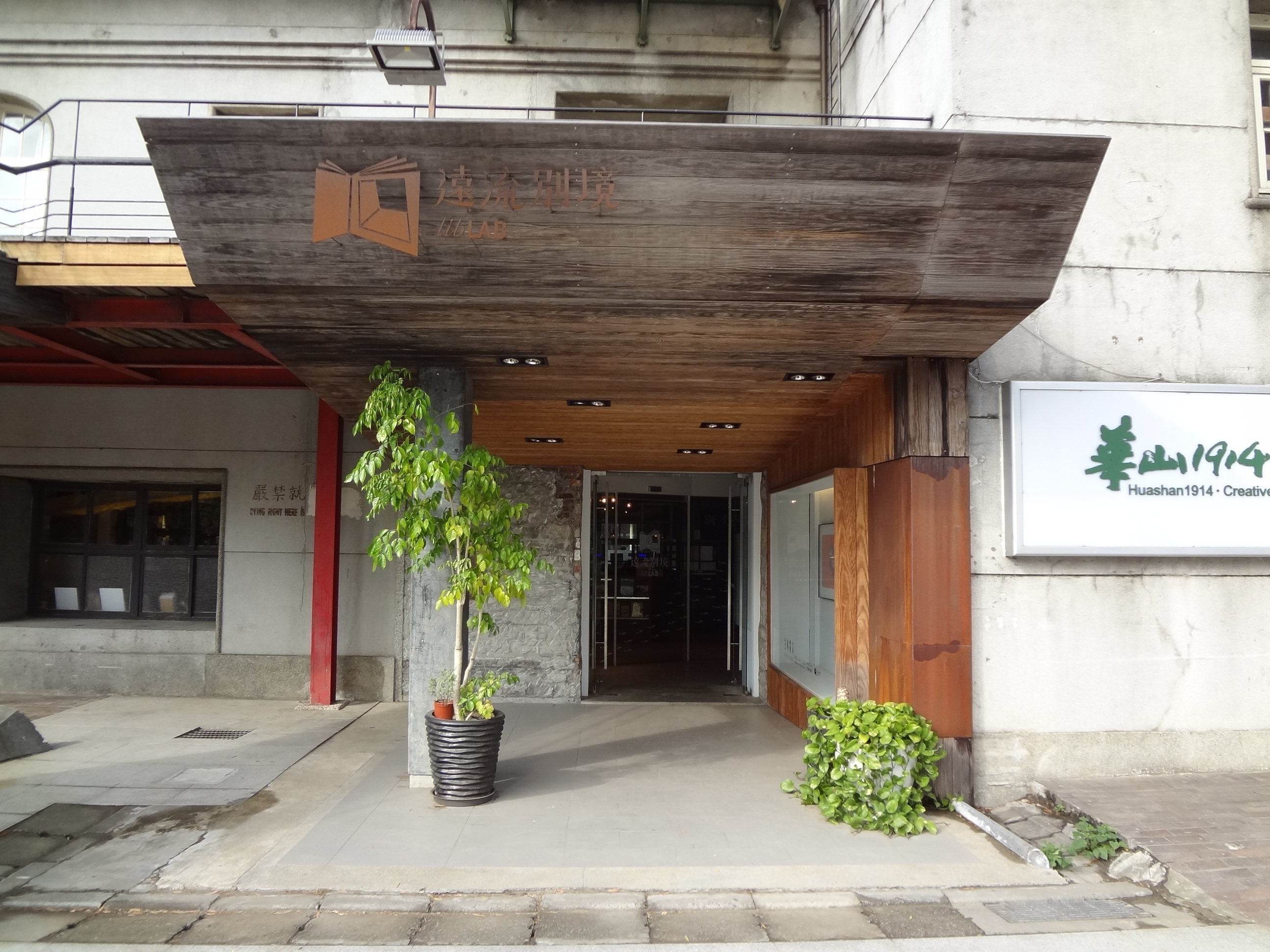 遠流別境，位於華山1914文化創意產業園區。